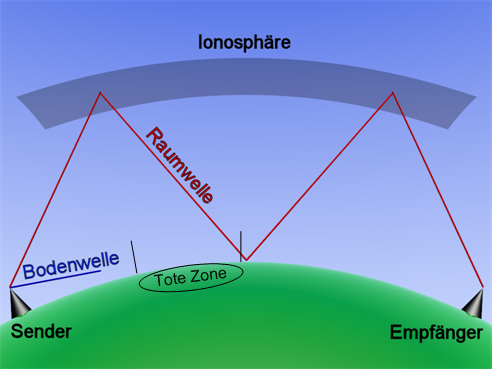 Visualization of a radio transmitter's dead zone.